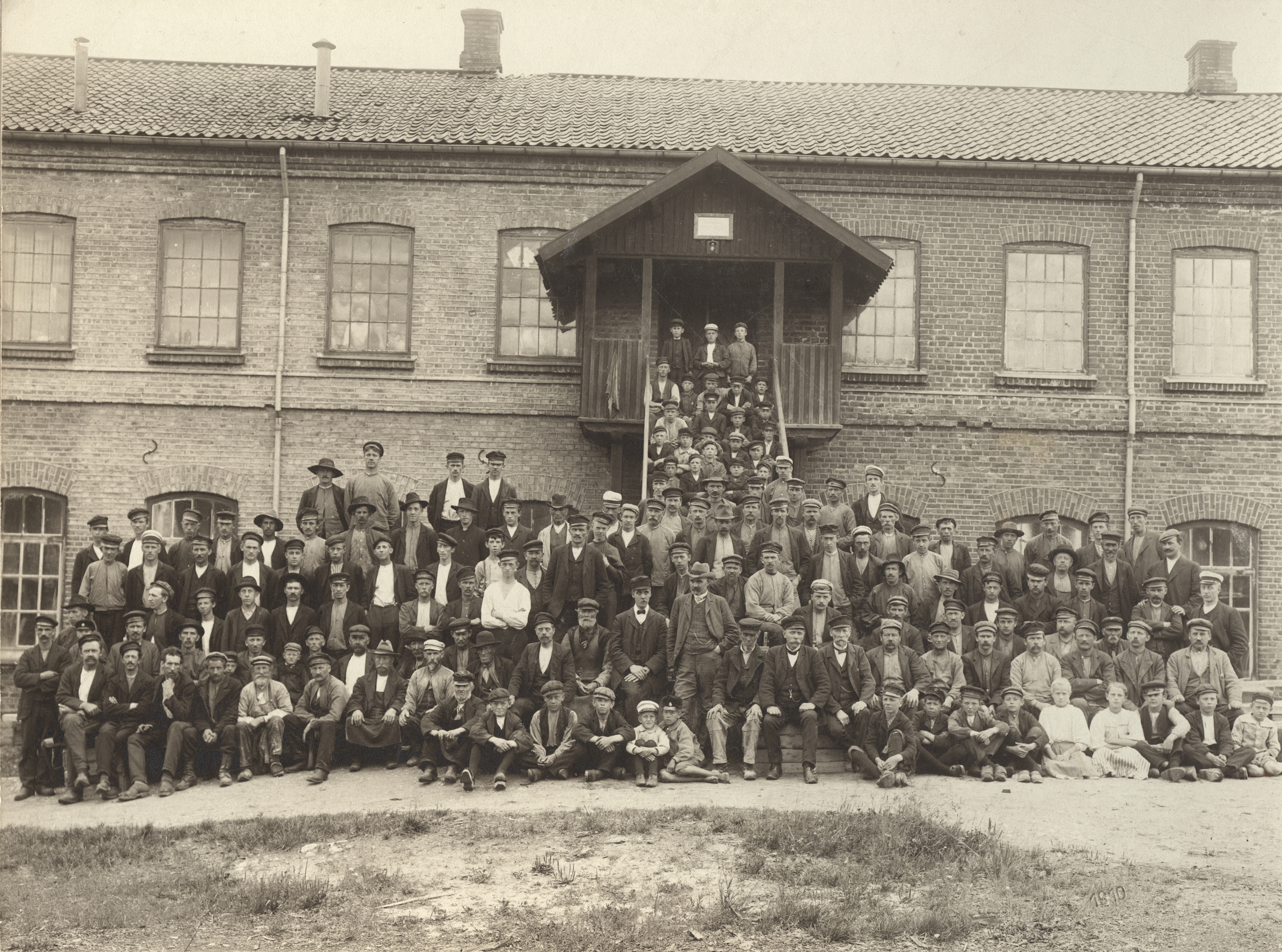 Bild som visar anställda vid Eda Glasbruk år 1910